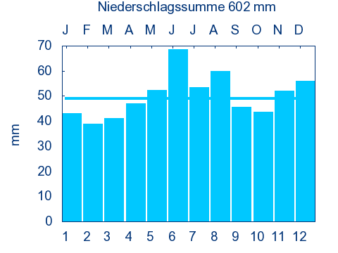 Mittelwerte von 1961 - 1990, generiert mit awk und gnuplot